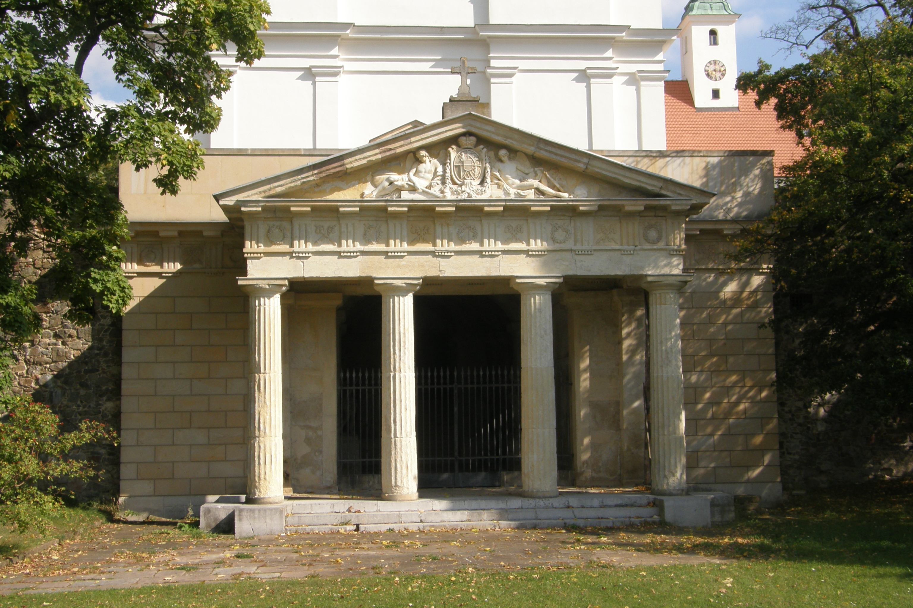 klášter paulánů (Vranov), Vranov 6 - hrobka Lichtensteinů